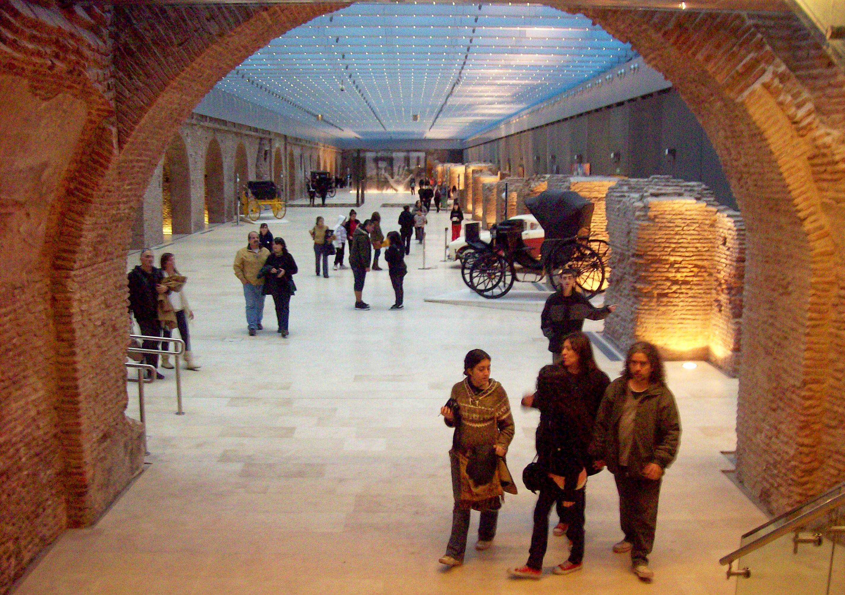 Vista desde la entrada al Museo del Bicentenario, en la Casa Rosada, Buenos Aires, Argentina.